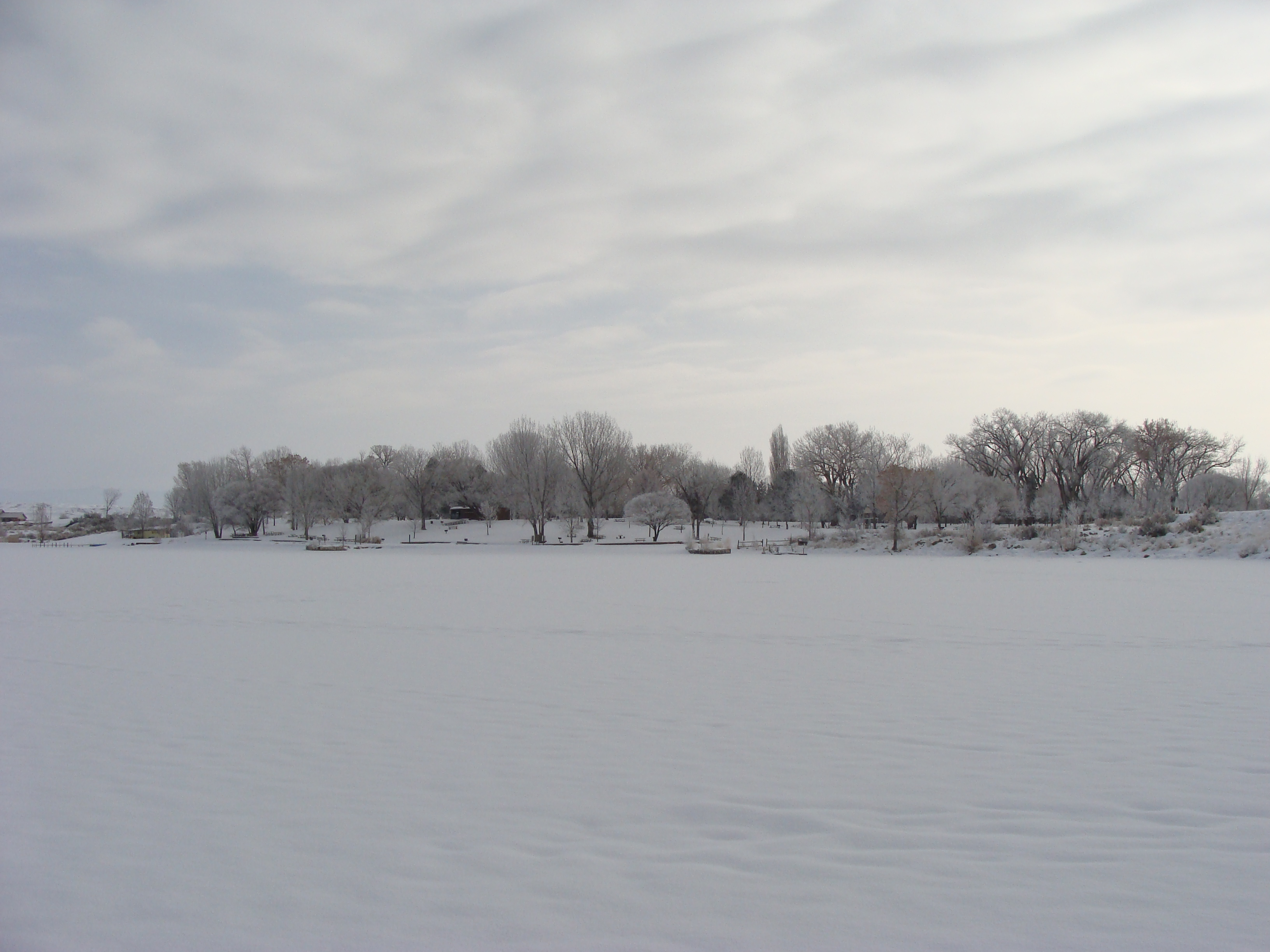 Highline Lake